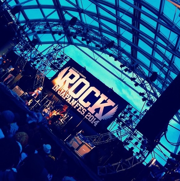 ROCK IN JAPAN FESTIVAL 2014の会場の様子